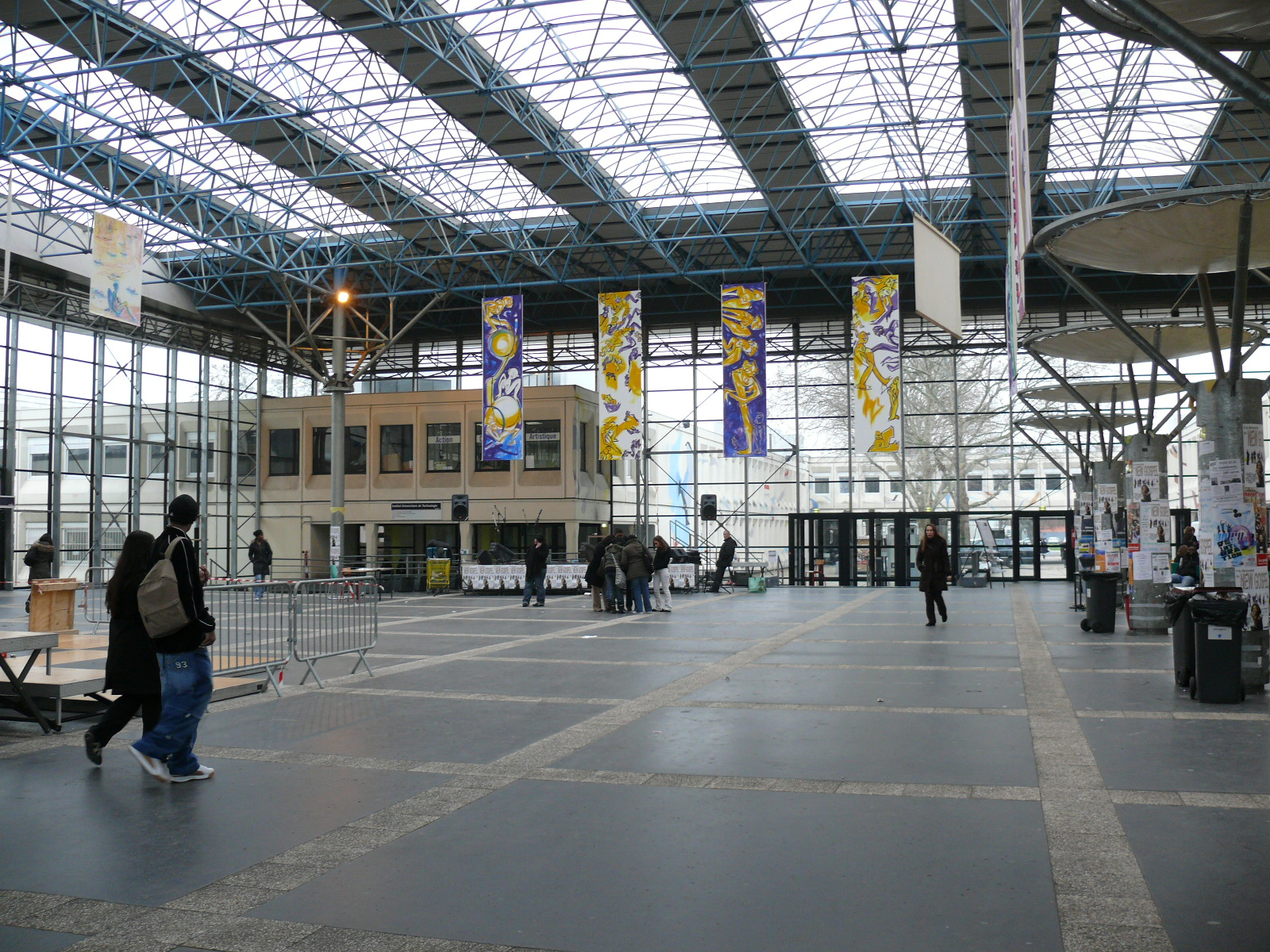 VILLETANEUSE : Forum de l'Université Architecte : du bâtiment initial : Adrien Fainsilber de la restructuration en Forum (1992): SCP Bechin et macchini (paris)